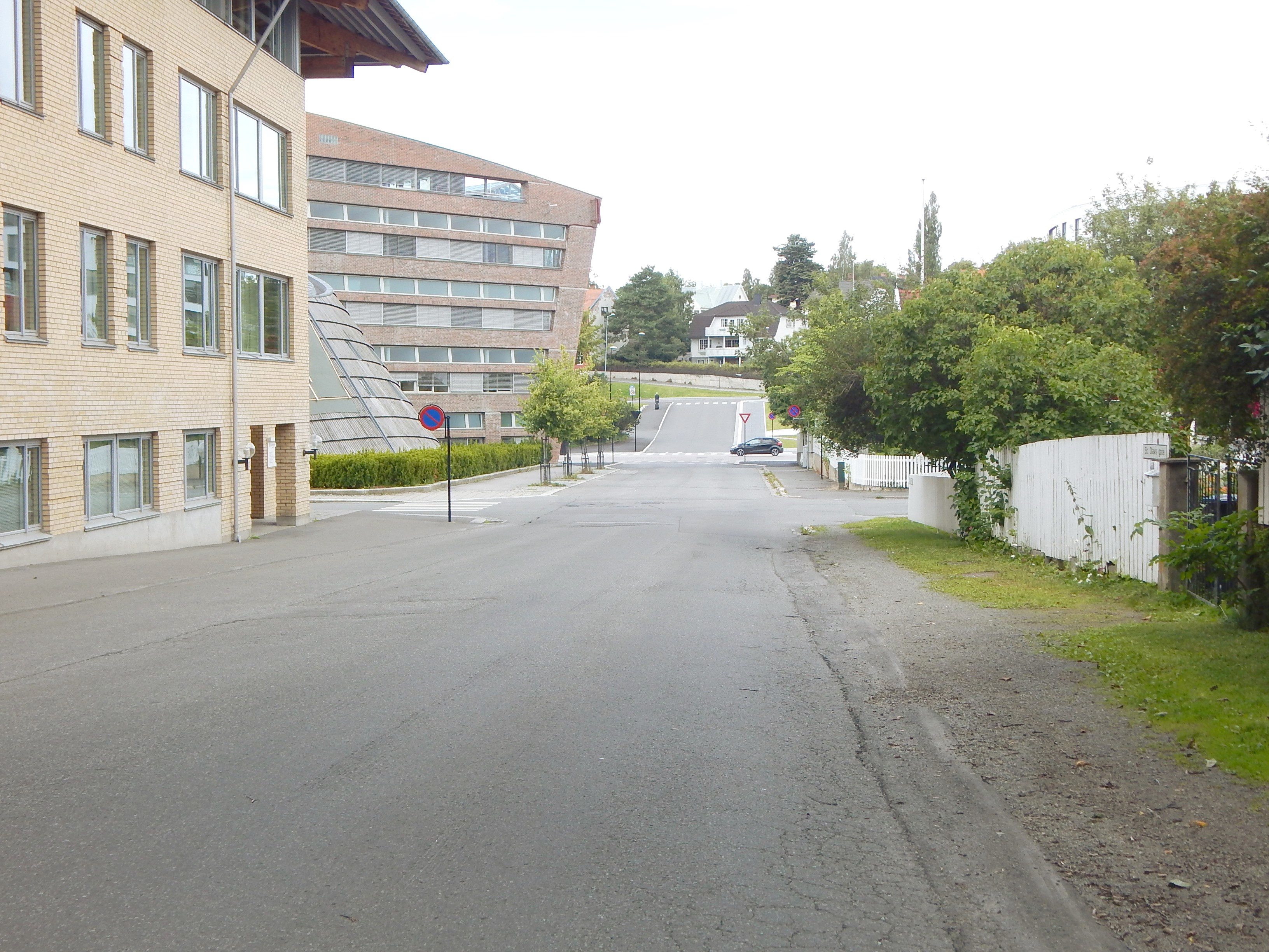 St. Olavs gate på Hamar